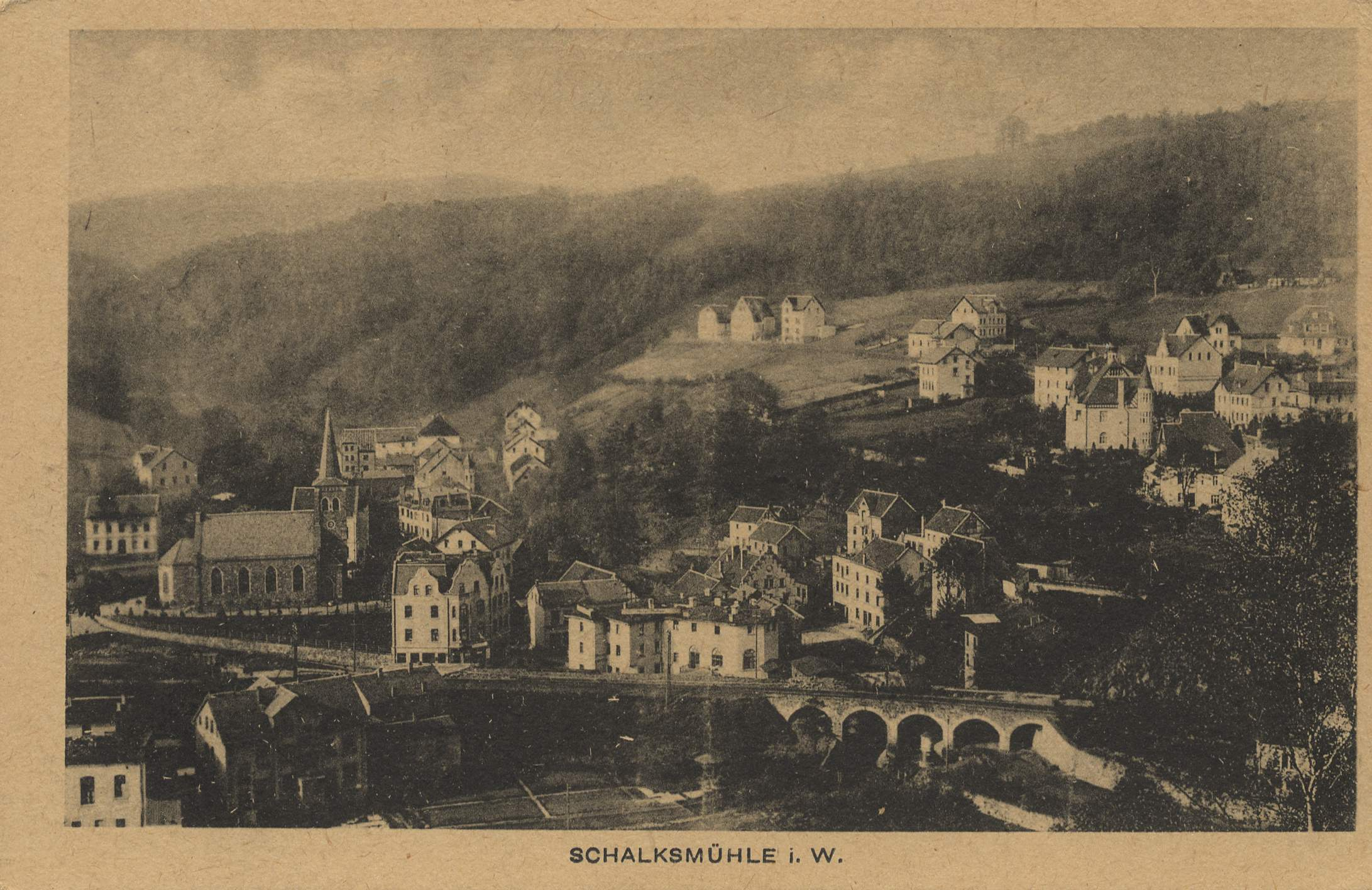 Stadtansicht